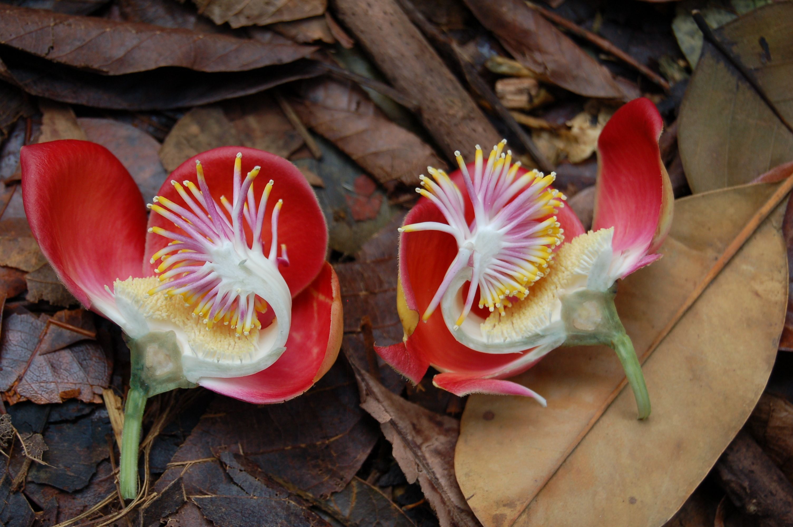 fleur en coupe. Jardín Botánico de Cienfuegos (Cuba)